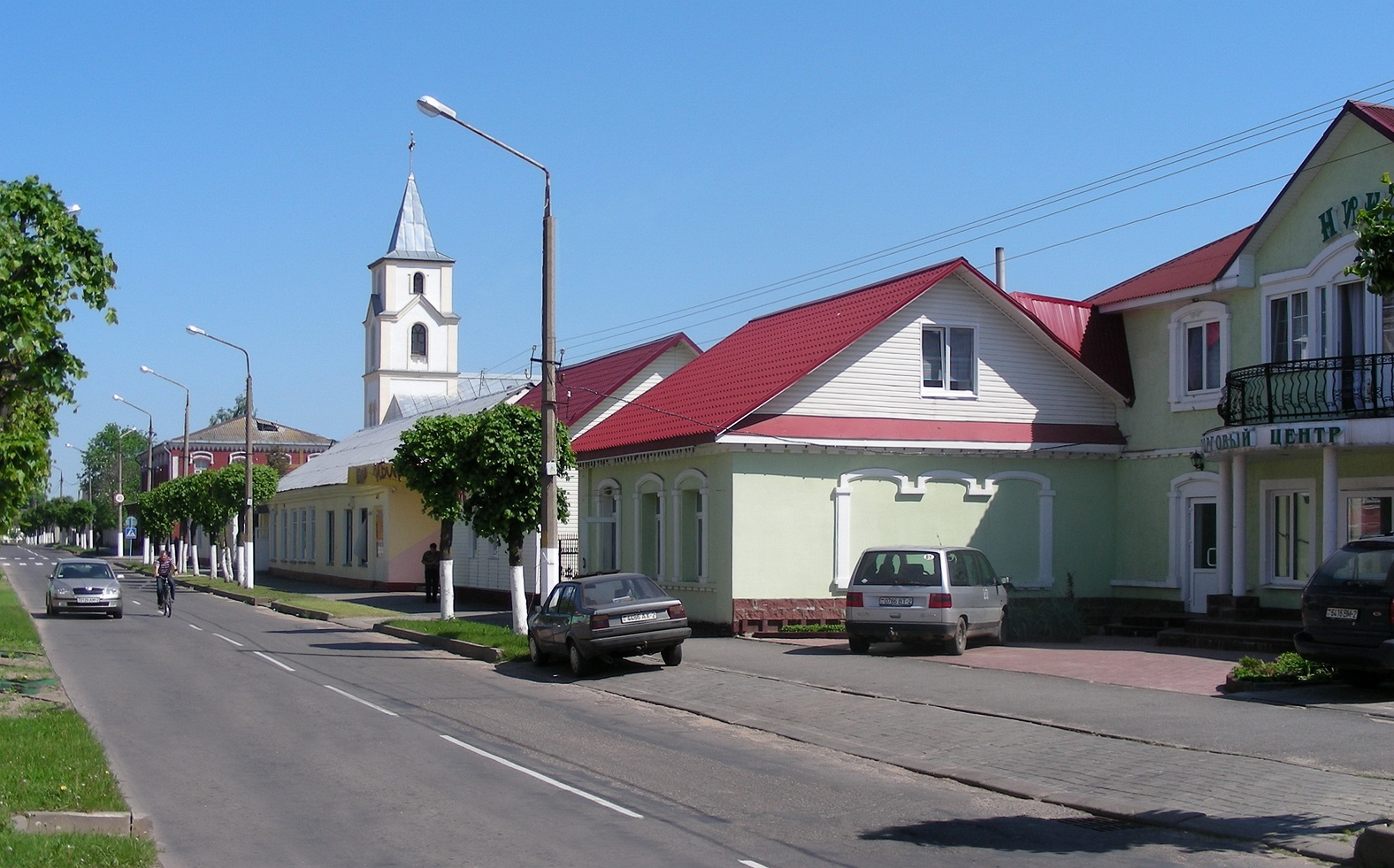 BELARUS / VERHNEDVINSK (Верхнядзвiнск). Downtown.